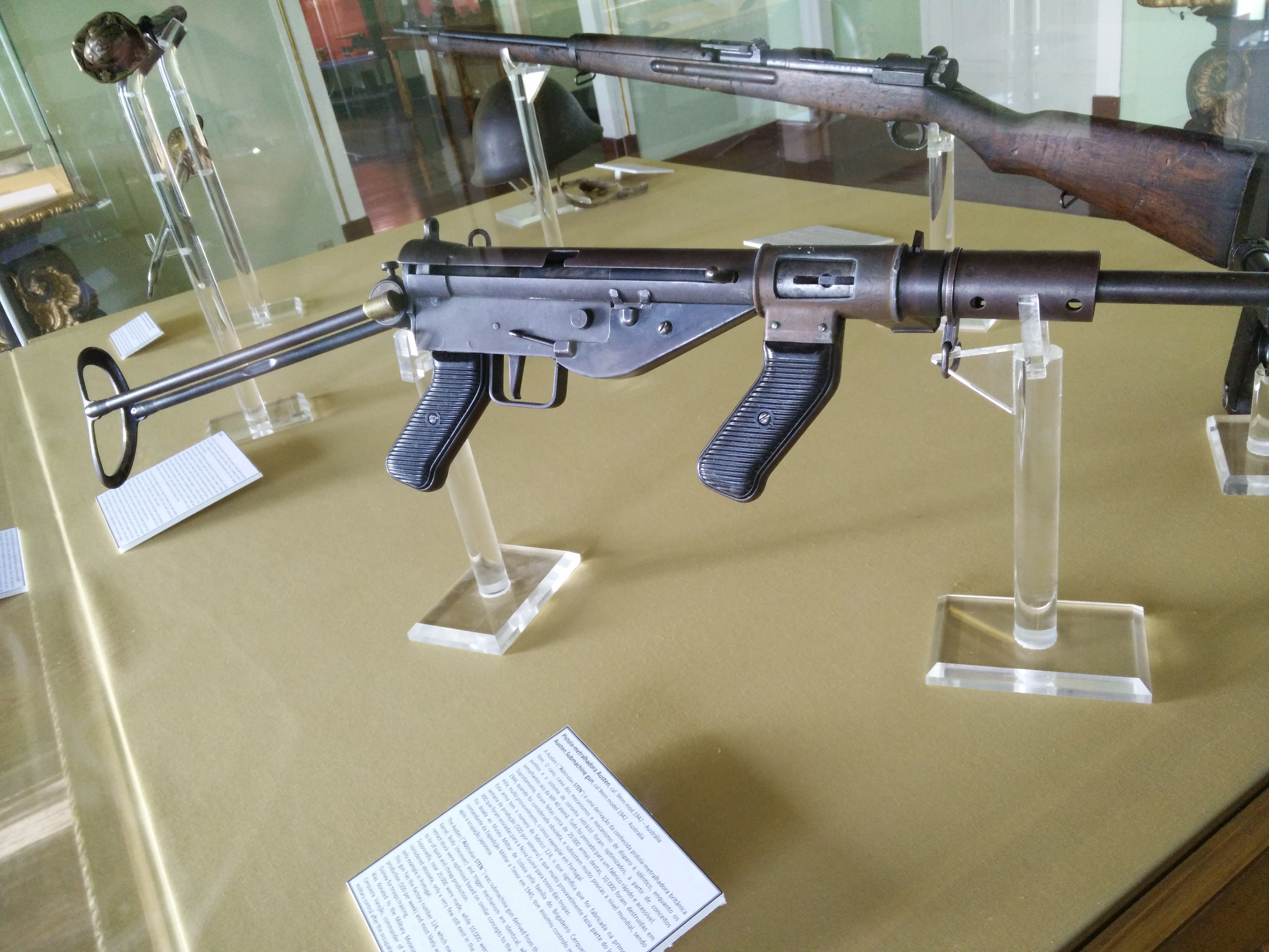 Avstralska brzostrelka Austen